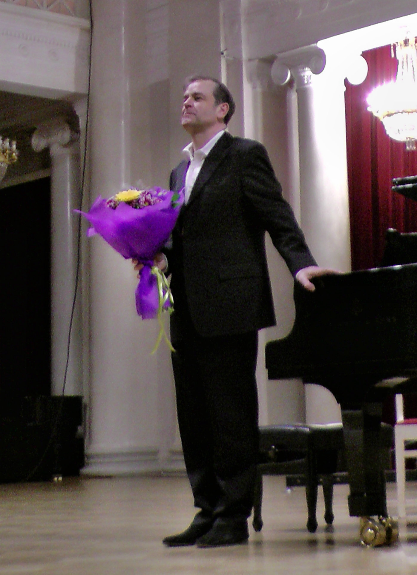 Джулиус Дрейк на концерте в Большом зале филармонии Санкт-Петербурга. 21.12.2014.